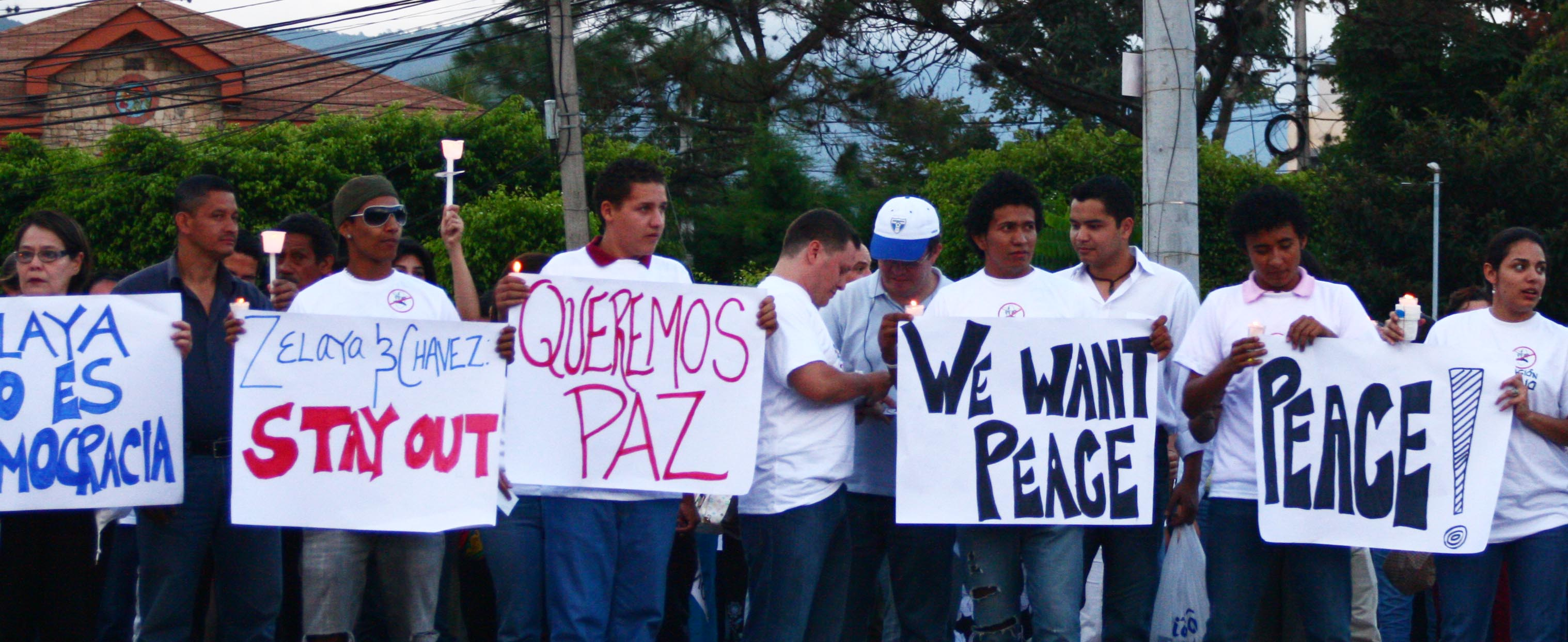 "Zelaya and Chavez STAY OUT", "We want peace", "We want peace", "peace!". Original: Manifestación pacífica, miércoles 1 de Julio, Casa de las Naciones Unidas, Tegucigalpa.